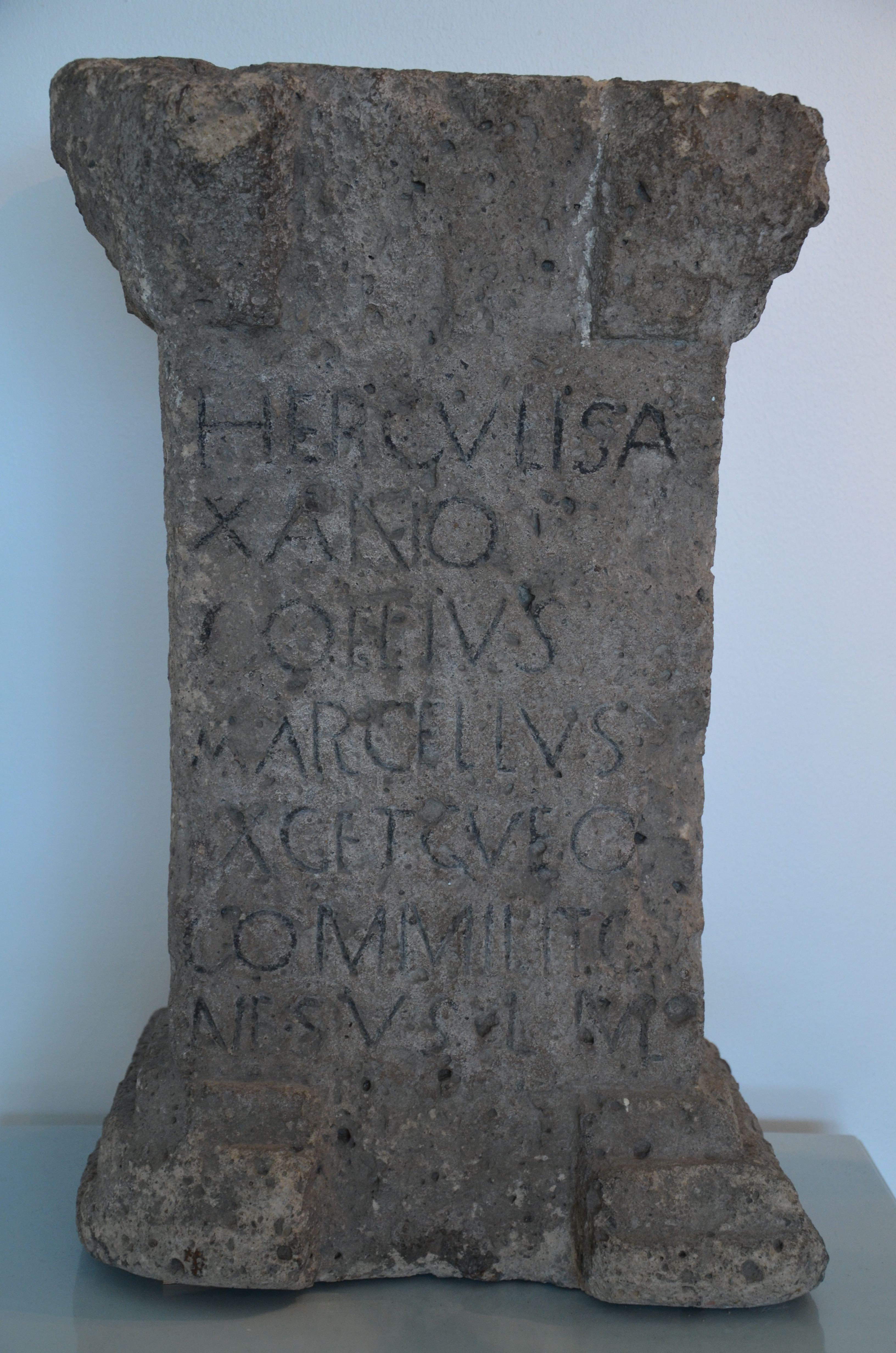 Museum het Valkhof, Nijmegen (Netherlands)